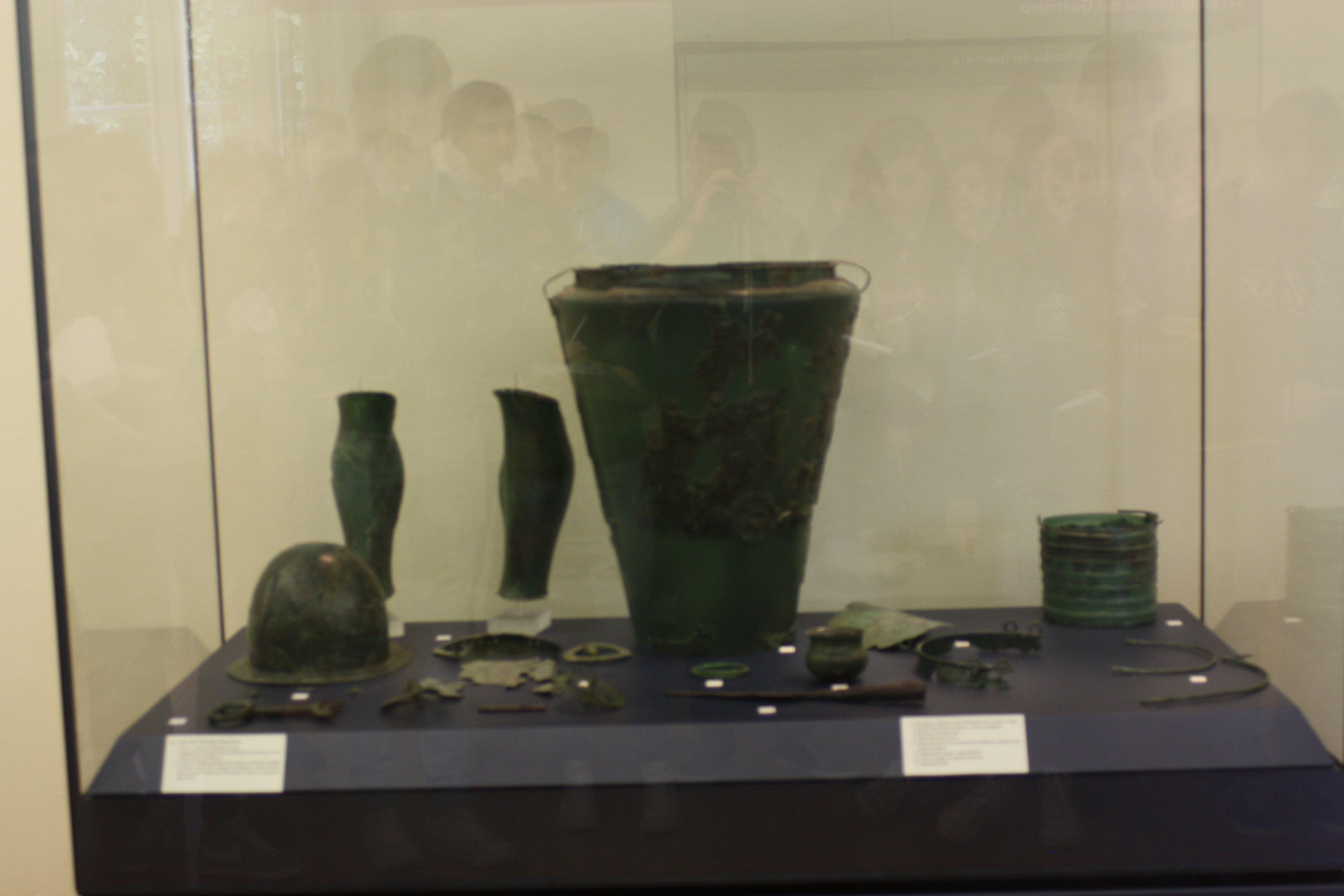 Vetrina della Seconda Tomba del Guerriero al Museo Civico Archeologico di Varese